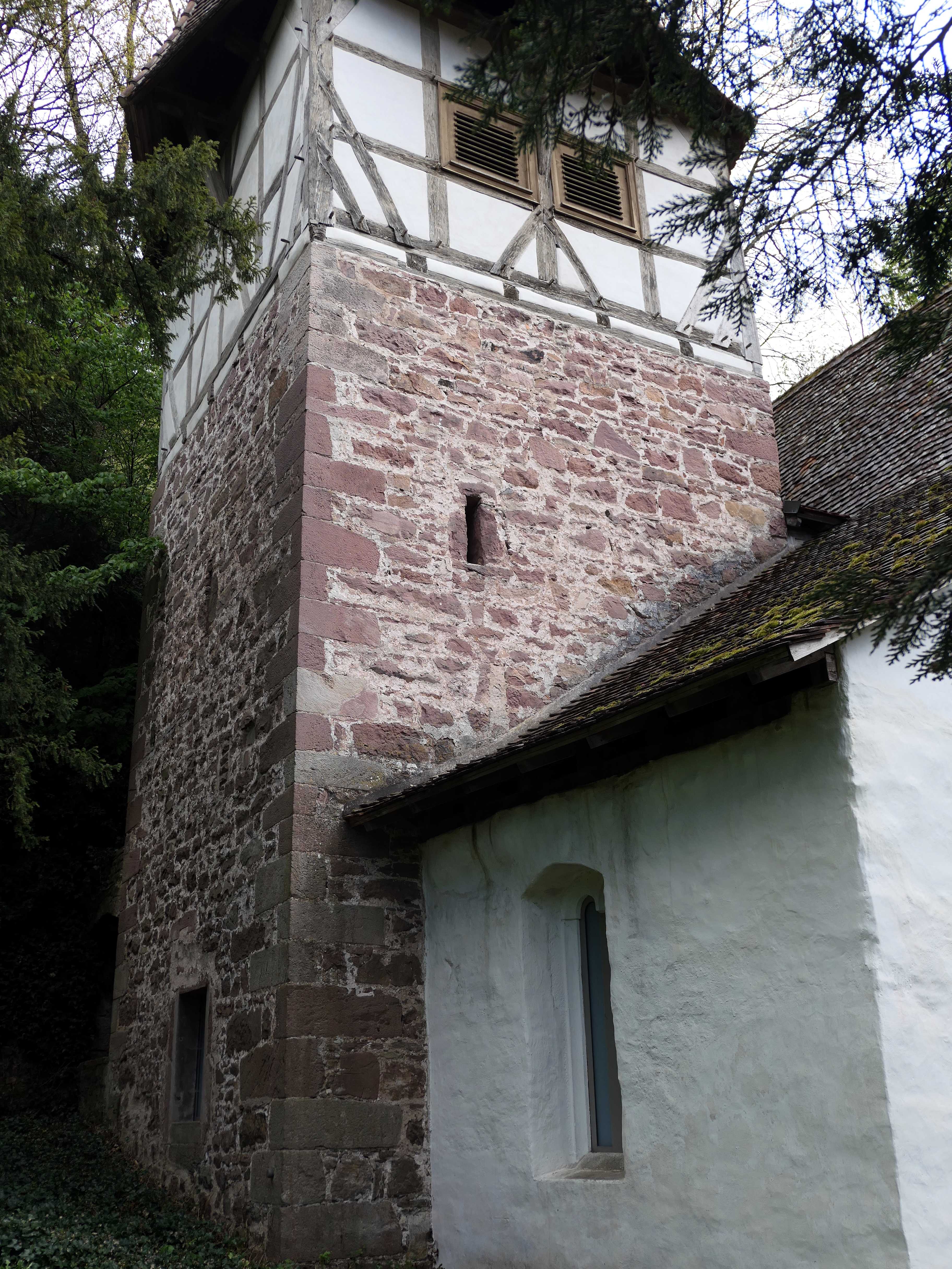 Neuenbürg St. Georg Turm Fachwerk